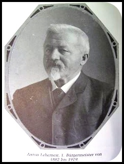 Anton Lehemeir (1841-1933) Bürgermeister von Trostberg, Deutscher Reichstags- und Bayerischer Landtagsabgeordneter (Zentrum)